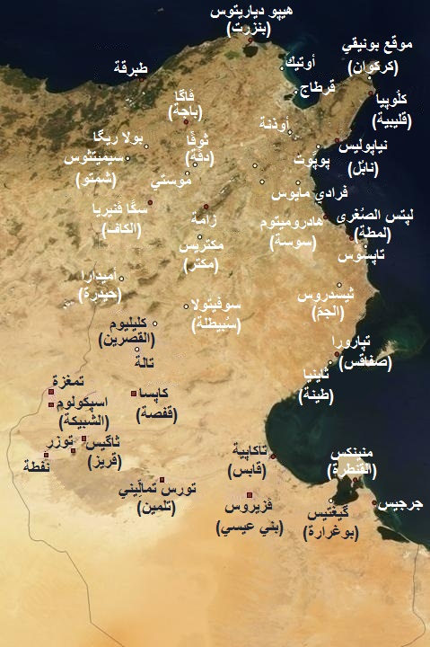 خارطة ساتليَّة لِتُونُس تظهر فيها المواقع الأثريَّة البونيقيَّة والرومانيَّة. تُشيرُ النقاط البيضاء إلى مواقع أثريَّة مُهمَّة، بينما تُشيرُ النقاط الحمراء إلى مواقع قديمة أُخرى.